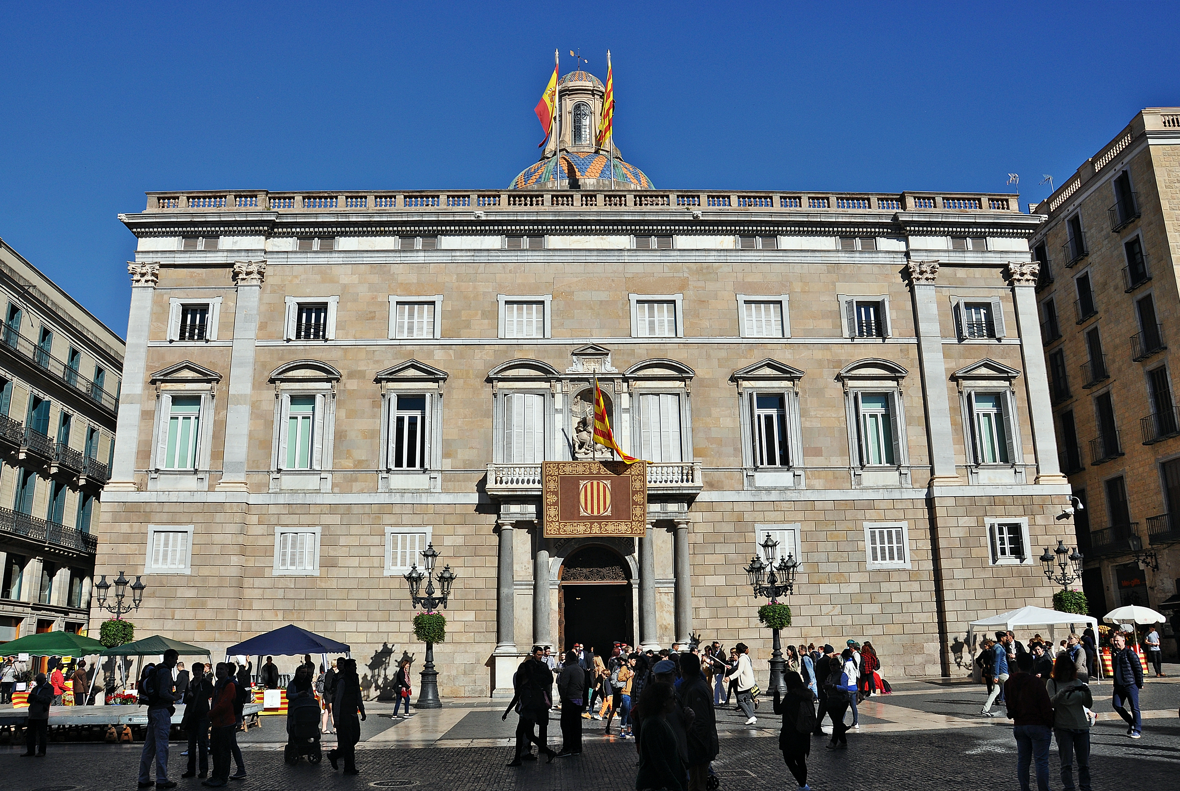 Plaza de Sant Jaume